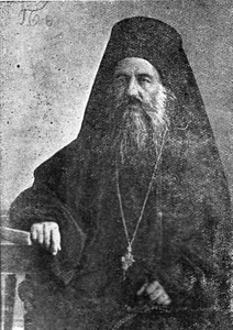 Petros Ikonomou from Ekshi Sou